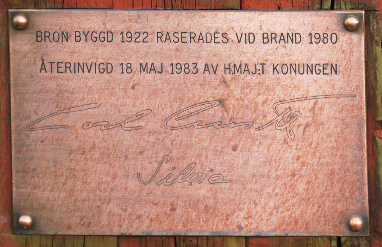 Minnestavla på Hängbron i Dala-Floda